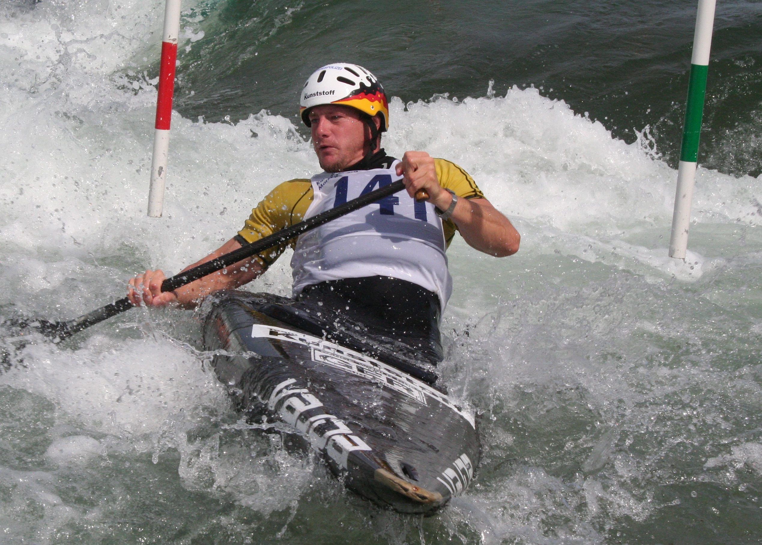 Deutscher Kanu-Slalomfahrer im Einer-Canadier.